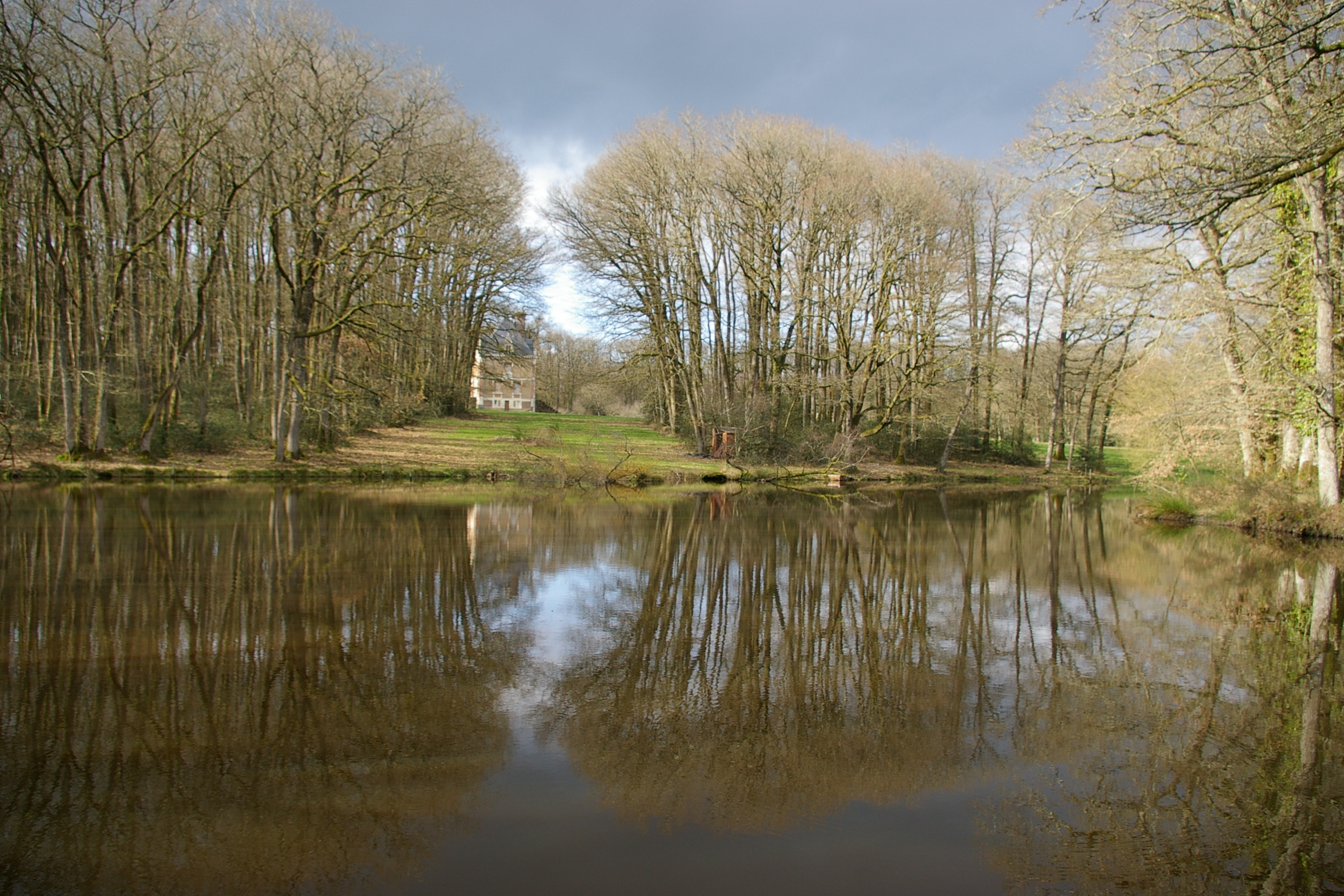 Etang du château de l'Essart, Forêt de la Charnie (Sainte-Suzanne, Mayenne)